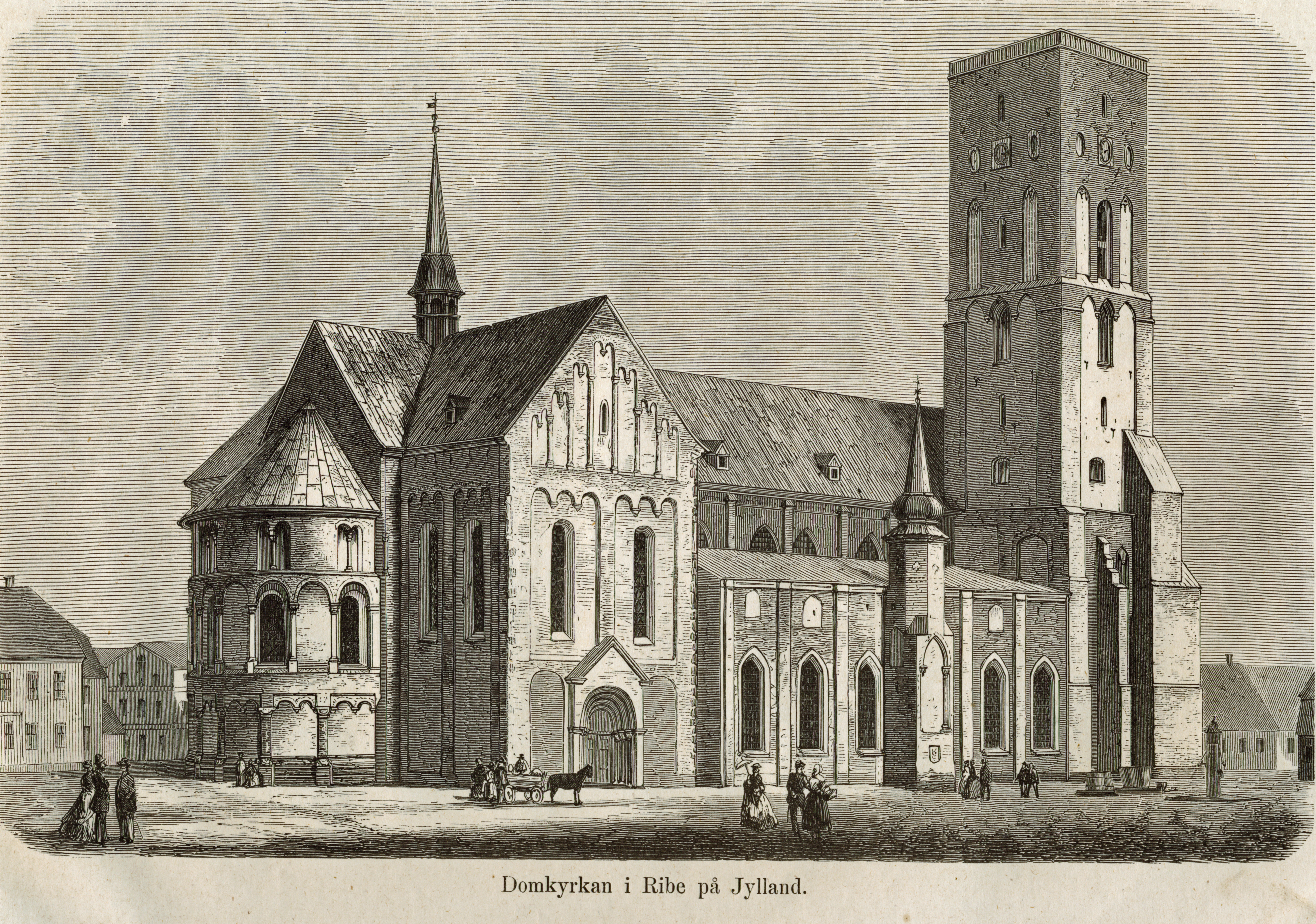 Illustrasjon hentet fra boken Nordiska taflor av ukjent forfatter og utgitt av Albert Bonnier (se, 1873)